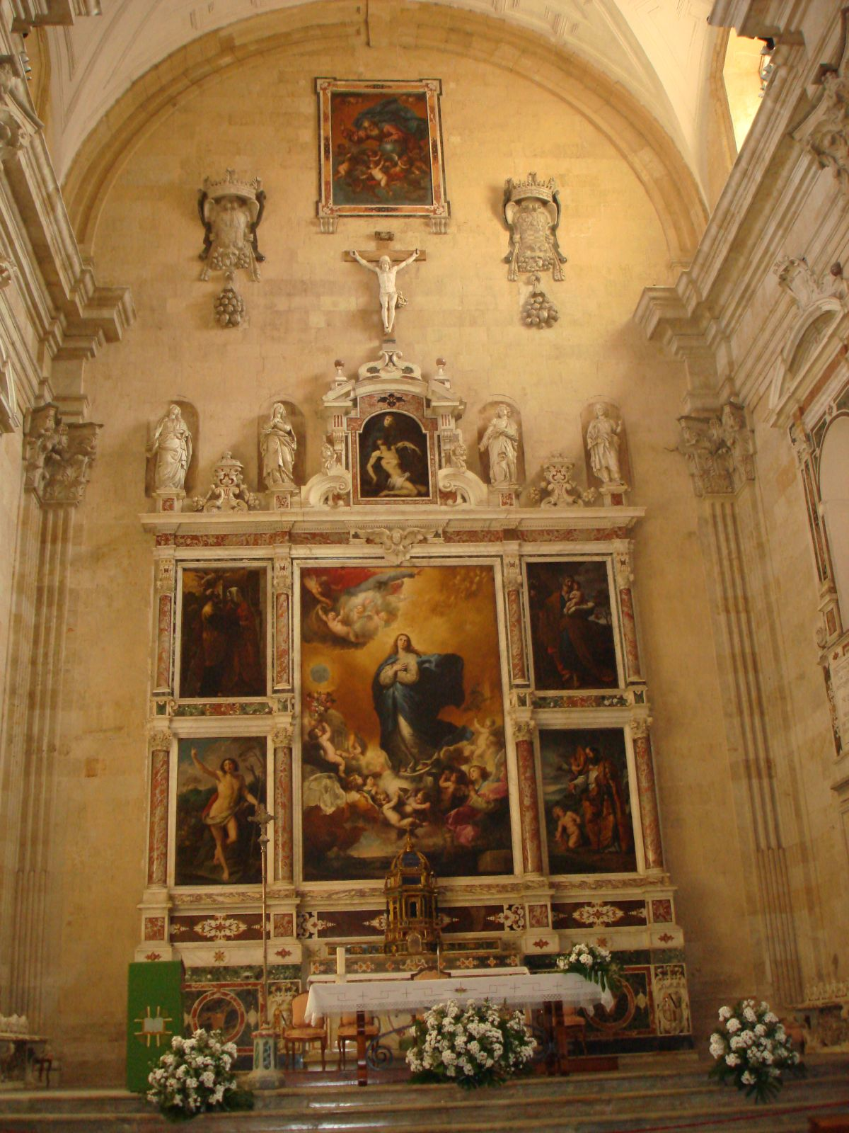 Altar mayor de la Iglesia de la Purísima, Salamanca.